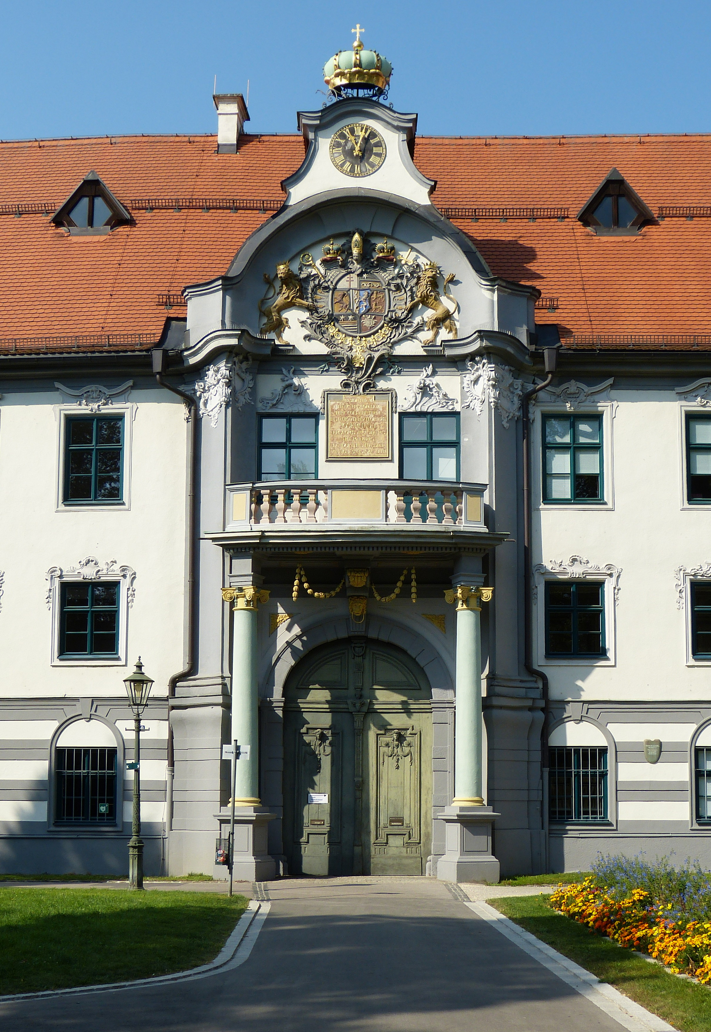 Augsburg, Fronhof, Tor und Fassadendetail im Mitteltrakt der Fürstbischöflichen Residenz.